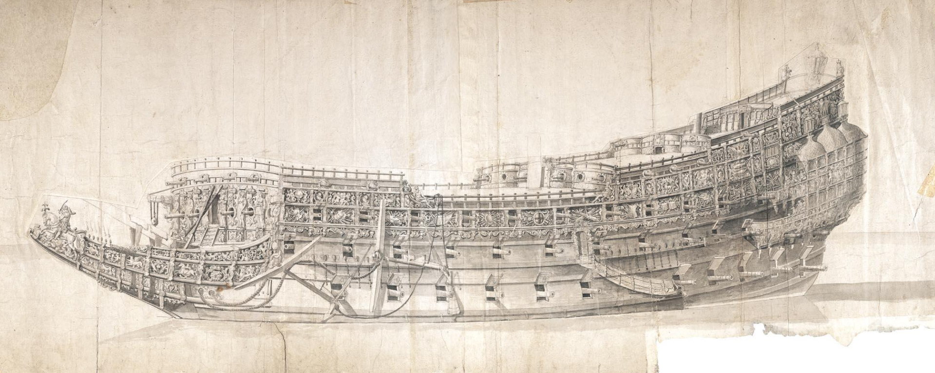 Die so genannte Morgan-Zeichnung von Willem van de Velde dem Älteren von der Sovereign of the Seas (1637)